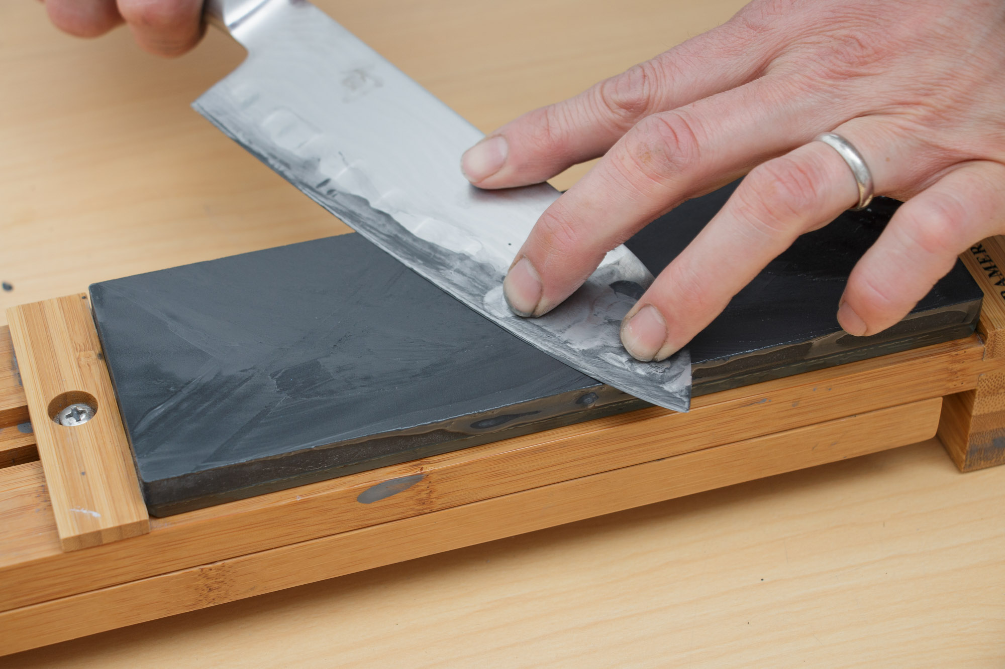 Schärfen eines Kochmessers mittels eines Messerschärfers, hier einem Japanischen Wasserstein.